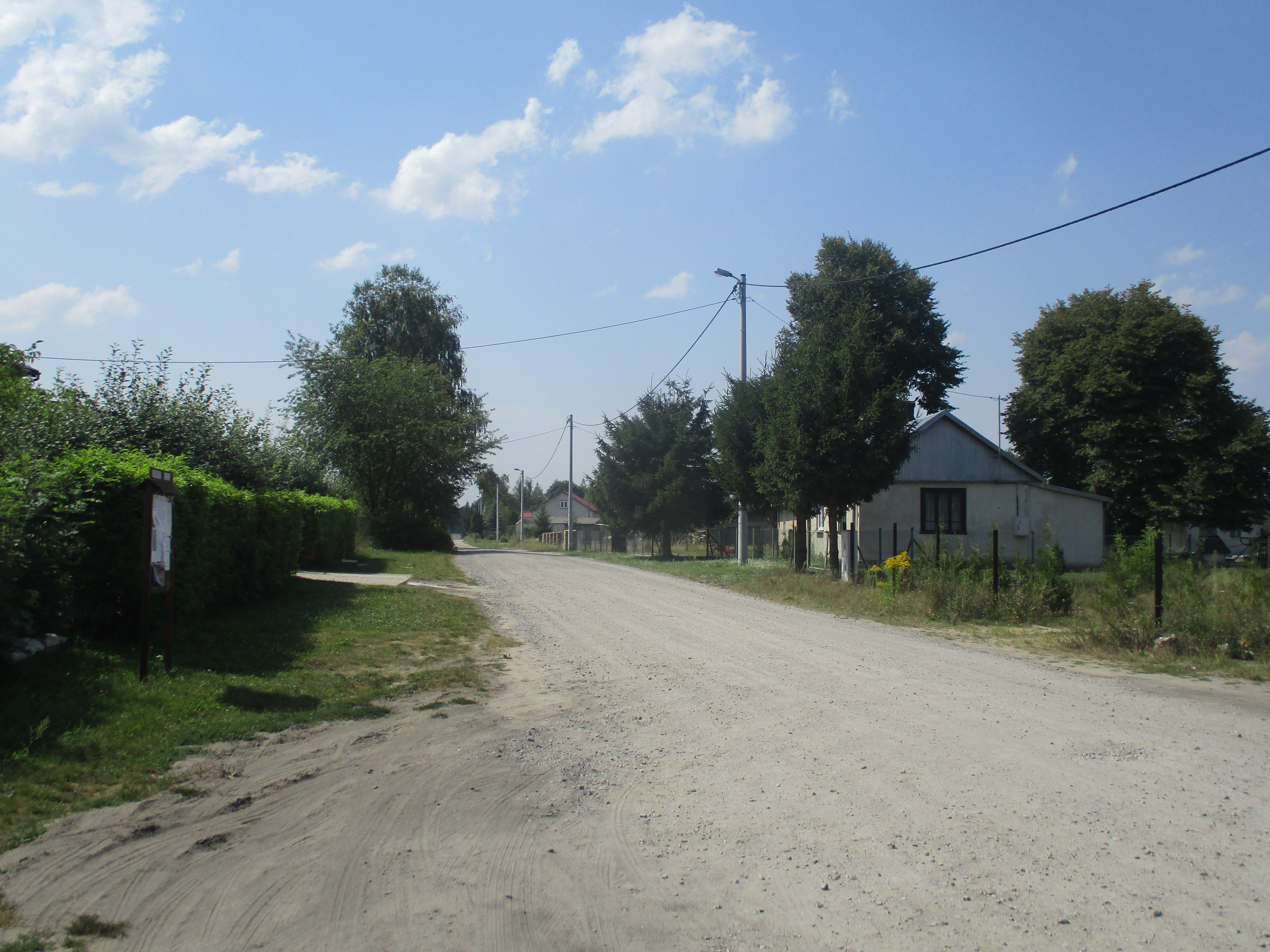 Wieś Okuninka, na południe od Włodawy